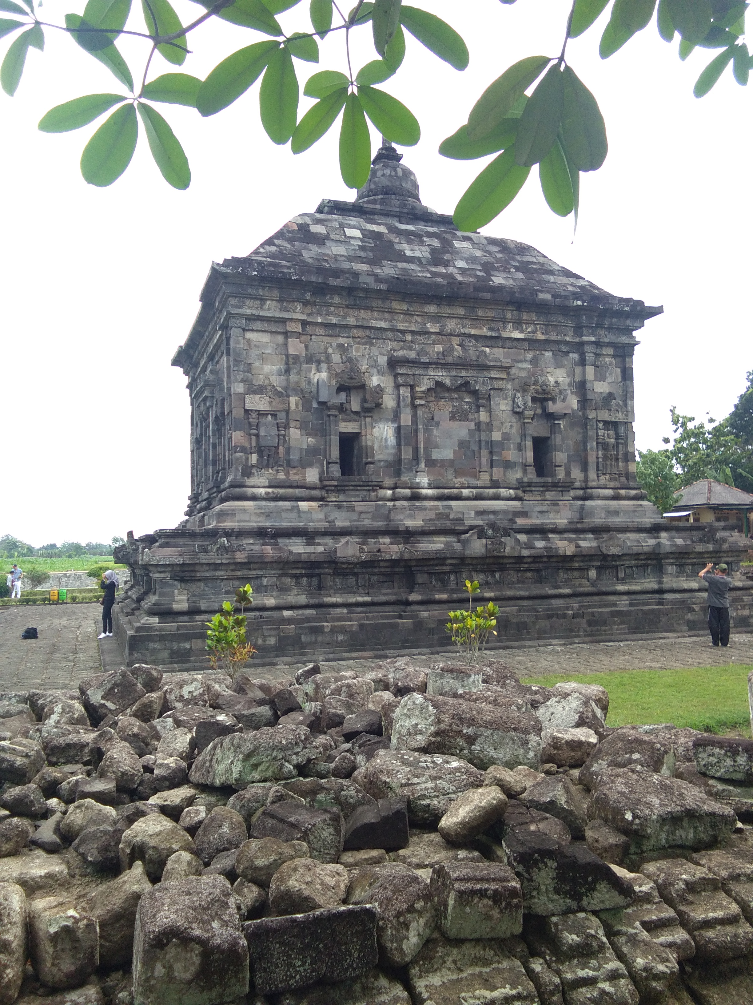 Basa Jawa: Candi punika minangka salah sawijining candi ingkang mapan ing Yogyakarta. Candi punika dados obyek wisata wonten mrika.